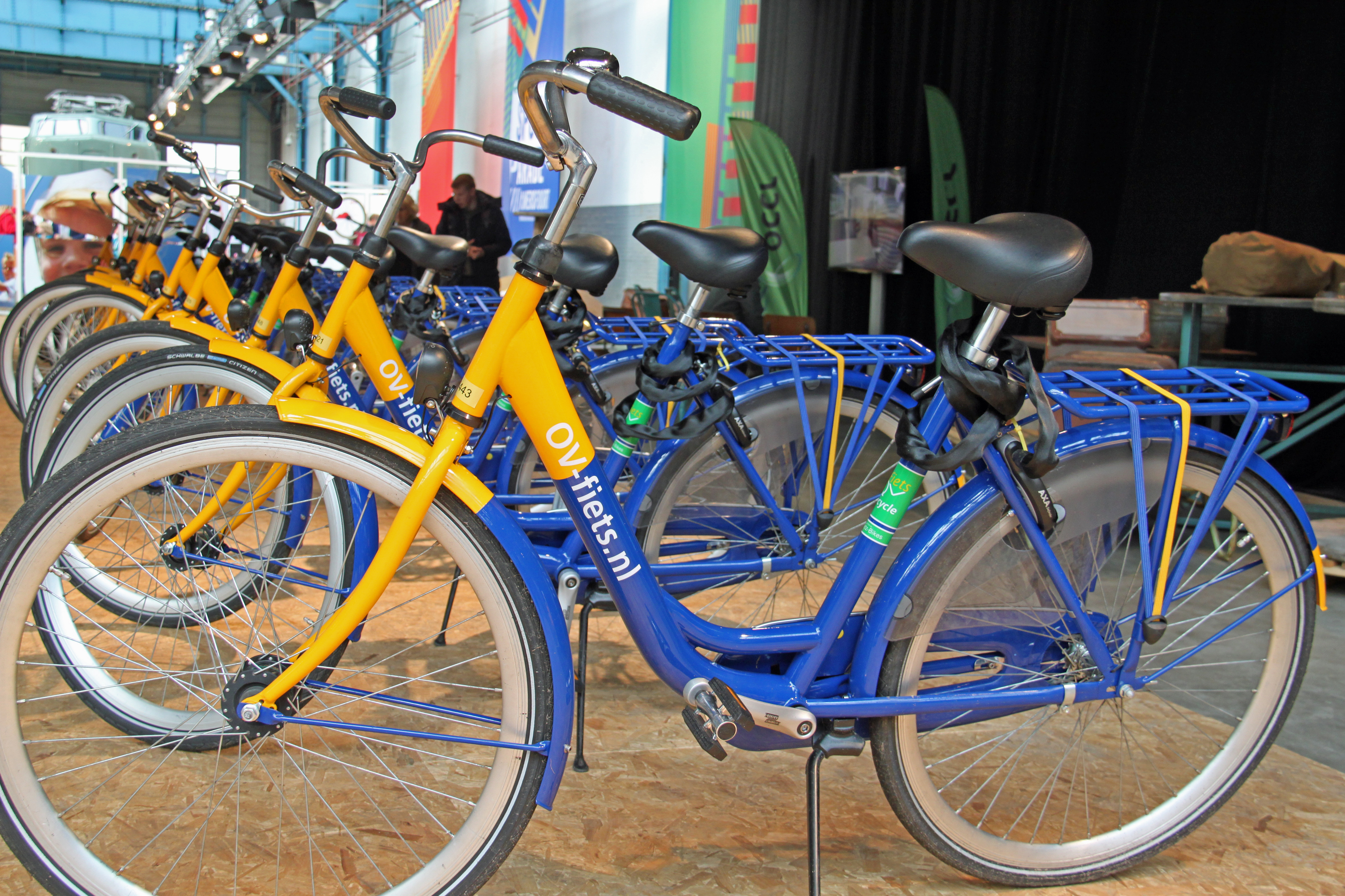 Een OV-fiets, gemaakt van onderdelen van oudere OV-fietsen. Dergelijke OV-fietsen recycle waren te zien tijdens de Spoorparade in Amersfoort.